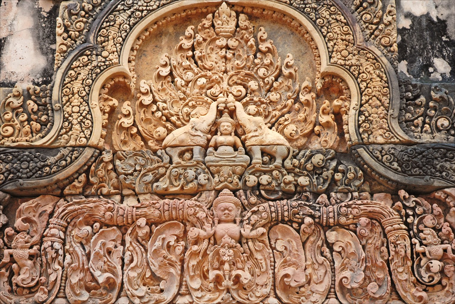 Fronton avec Lakshmi entre deux éléphants Banteay Srei veut dire "citadelle des femmes", c'est le nom moderne du temple d'Ishvarapura, "ville du seigneur". Il a été construit en grès rose, un matériau très résistant qui a permis - d'une part de réaliser des décors d'une grande finesse - d'autre part, de les conserver jusqu'à nos jours. Ce temple est consacré au dieu "seigneur suprême des trois mondes" en 967, à la fin du règne du roi Rajendravarman II (944-968). Il a été construit par l'un des conseillers du roi. C'est l'archéologue français Henri Marchal (1876-1970) qui en 1931 a entrepris la restauration du temple en utilisant la technique de l'anastylose. Le premier travail de restauration a en réalité démarré en 1924 après la tentative de vol de sculptures par André Malraux. C'est cet évènement qui paradoxalement a accéléré la restauration de ce temple et empêché les pillages qui se sont produits tout au long du XXème siècle sur d'autres temples comme par exemple celui de Koh Ker. Article de Wikipedia sur le temple de Banteay Srei